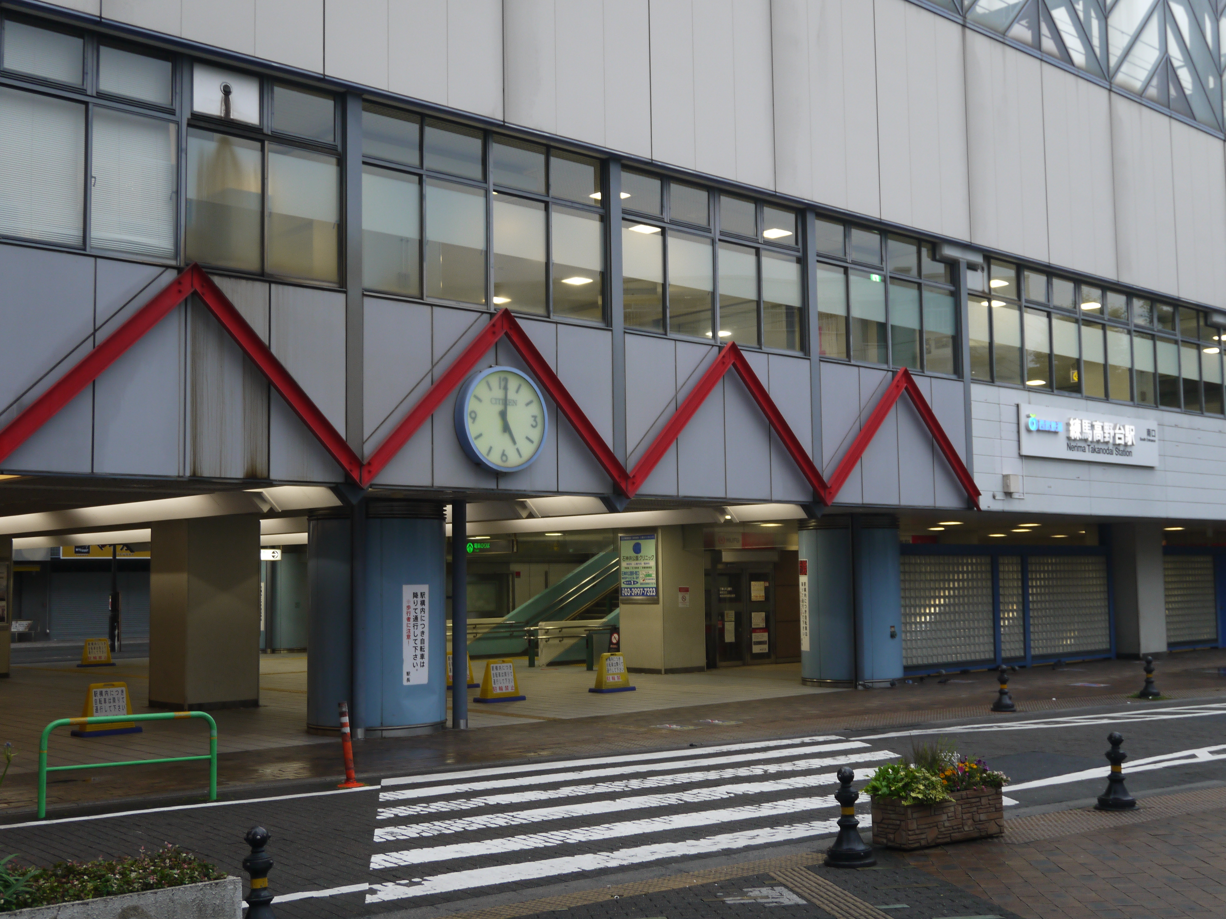 練馬高野台駅 Panasonic Lumix DMC-GF3